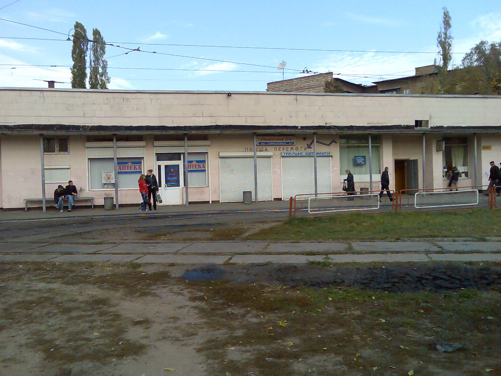 Станция скоростного трамвая «Площадь Победы» (Киев)